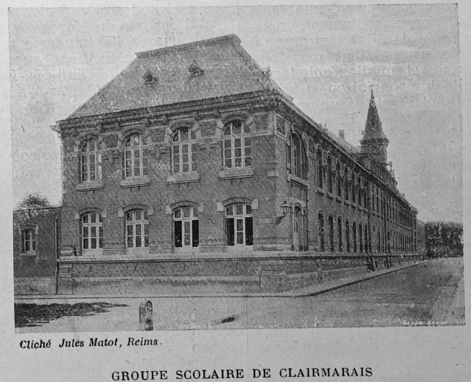 publié dans le "Bulletin de l'œuvre des voyages scolaires".